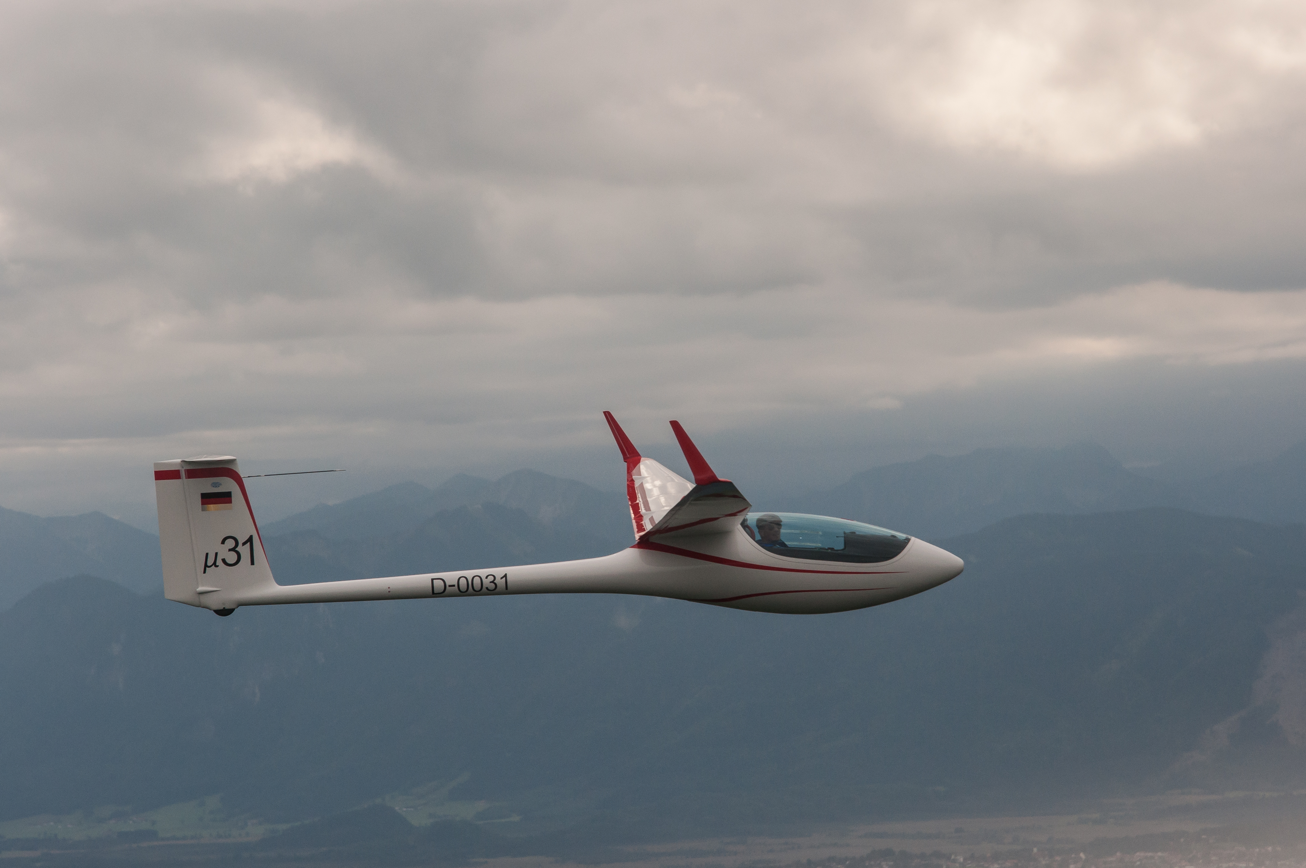 Die Mü 31 bei ihrem Erstflug am 15.09.2017